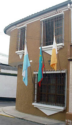 Dos banderas simbolizan la fe católica hacia la virgen las cuales tradicionalmente son izadas en las casas taribenses. cuyos colores son Blanco y Oro y Blanco y Azul Celeste Otra bandera usual es la del Municipio Cárdenas: Celeste, Verde y Rojo. (al centro)